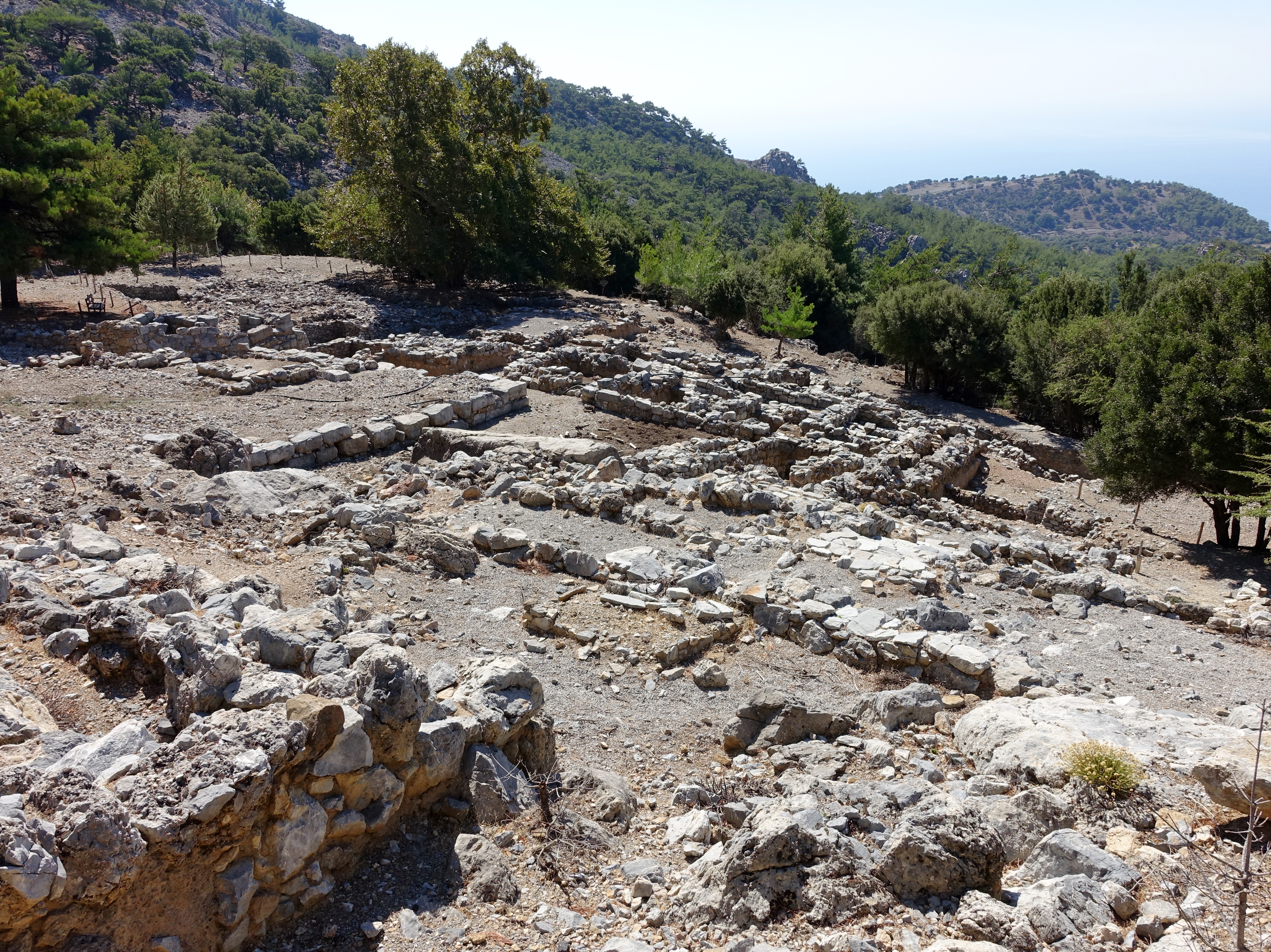 Heiligtum des Hermes und der Aphrodite oberhalb des Ortes Kato Symi (Κάτω Σύμη), Kreta, Griechenland